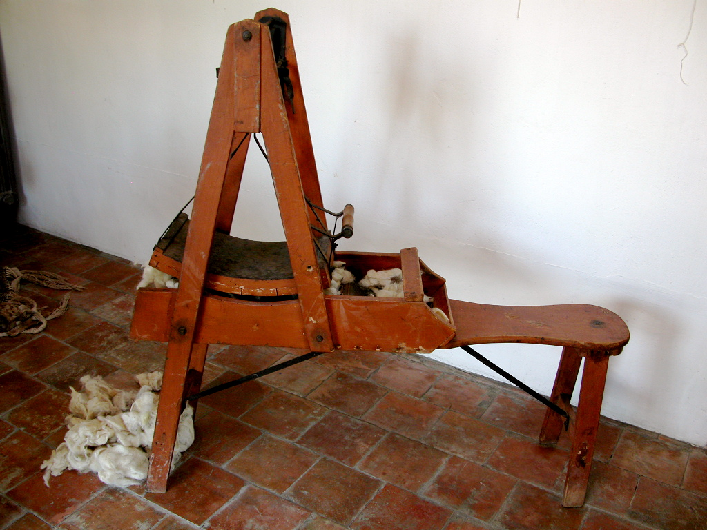 Foto mia personale, cardatrice da materassaio,2007 Licensing Categoria:Immagini sulla tessitura